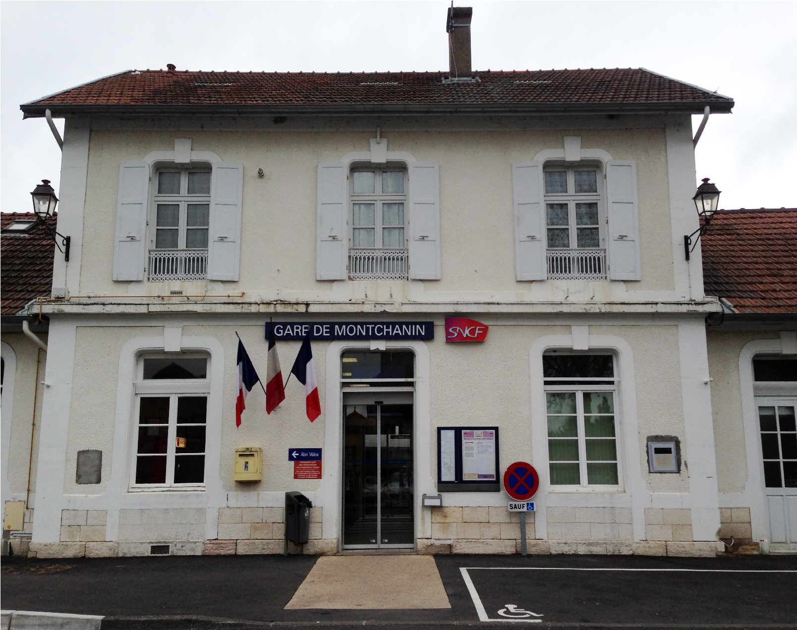 法国蒙沙南站（Gare de Montchanin）